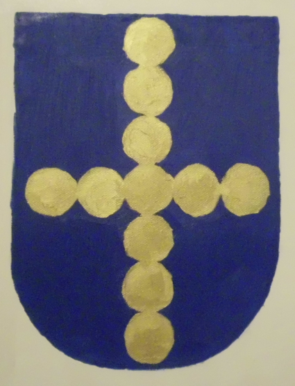 Wappen der Ritter von Holtzheim, In Blau 9 oder 10 oder 11 ins Kreuz gestellte Goldmünzen oder Kugeln. Darstellung in Acryl auf Leinwand des Künstlers Alexander M. Freiherr von Randerath